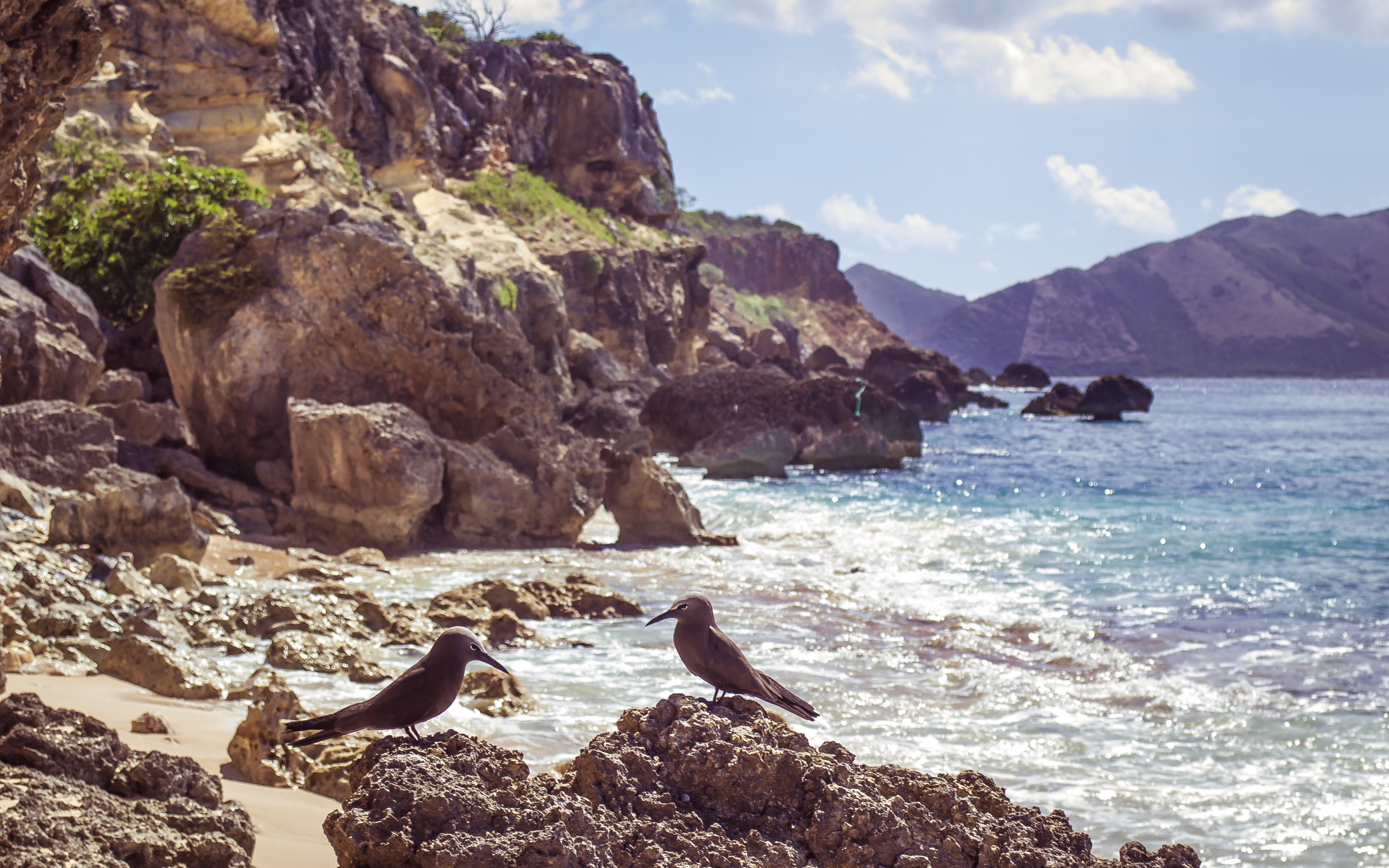 Les noddis bruns se réunissent sur les côtes de l'ilet Tintamarre (Saint-Martin) pour nicher. Reserve Naturelle de Saint-Martin